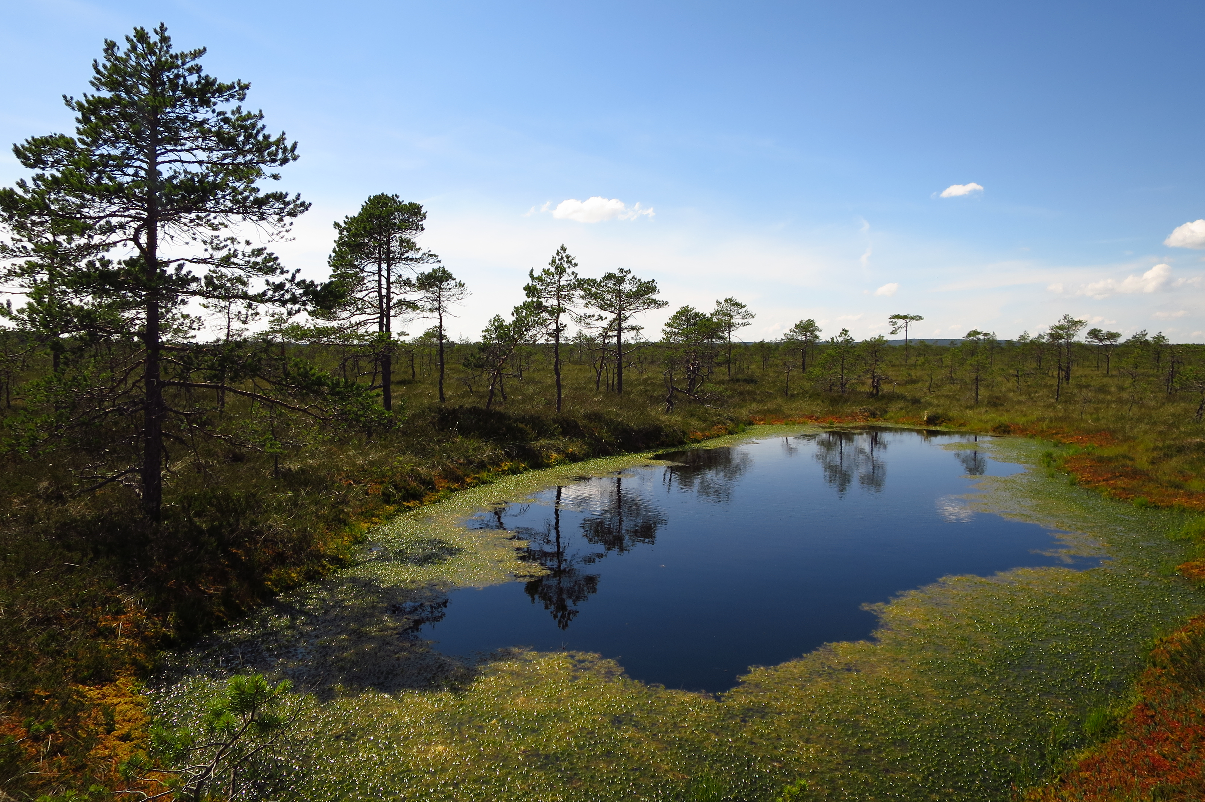 Laugas Rubina soos Rubina LKA-l